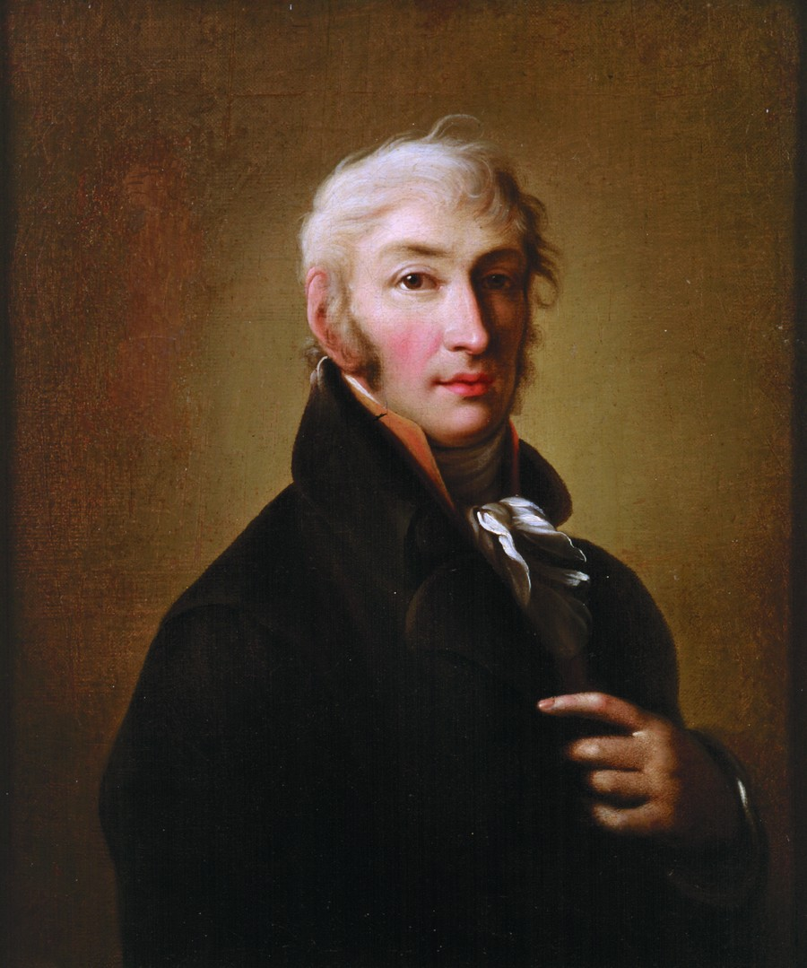 «Лучший здешний живописец Дамон обещает весною ехать с нами в деревню и написать там мой портрет сходно на досуге; тогда немедленно доставлю его вам» - из письма Н.М. Карамзина брату Василию, по просьбе которого он заказал портрет. Ж-Б Дамон-Ортолани, 1805 год. Портрет Н.М. Карамзина. Хранится в Ульяновском областном художественном музее. Поступил из Симбирской Губернской Архивной комиссии